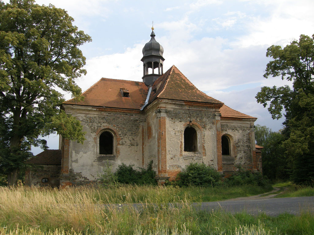 Kostel svaté Barbory v obci Všekary v okrese Domažlice